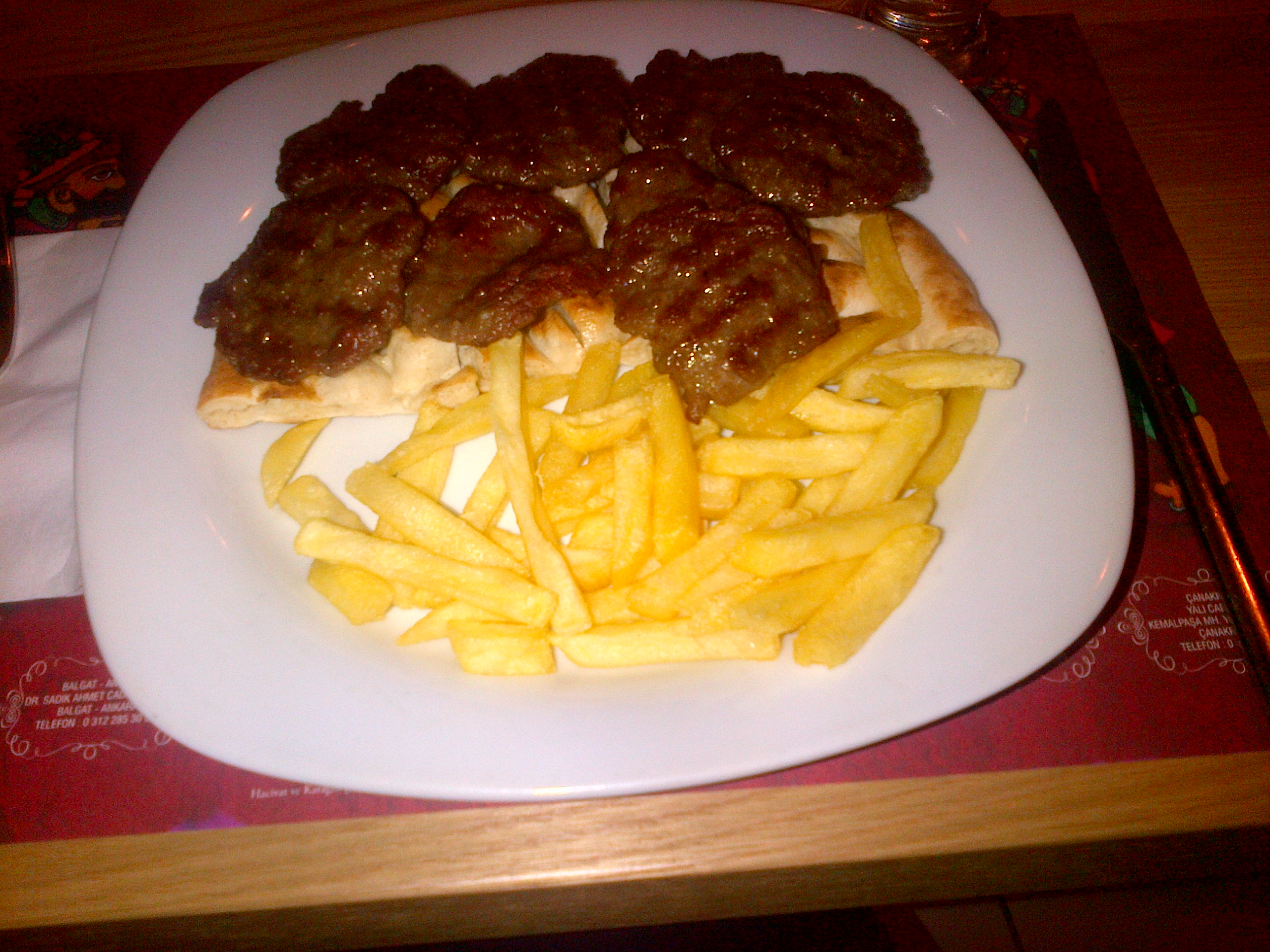 Köfte turco con patatas fritas.